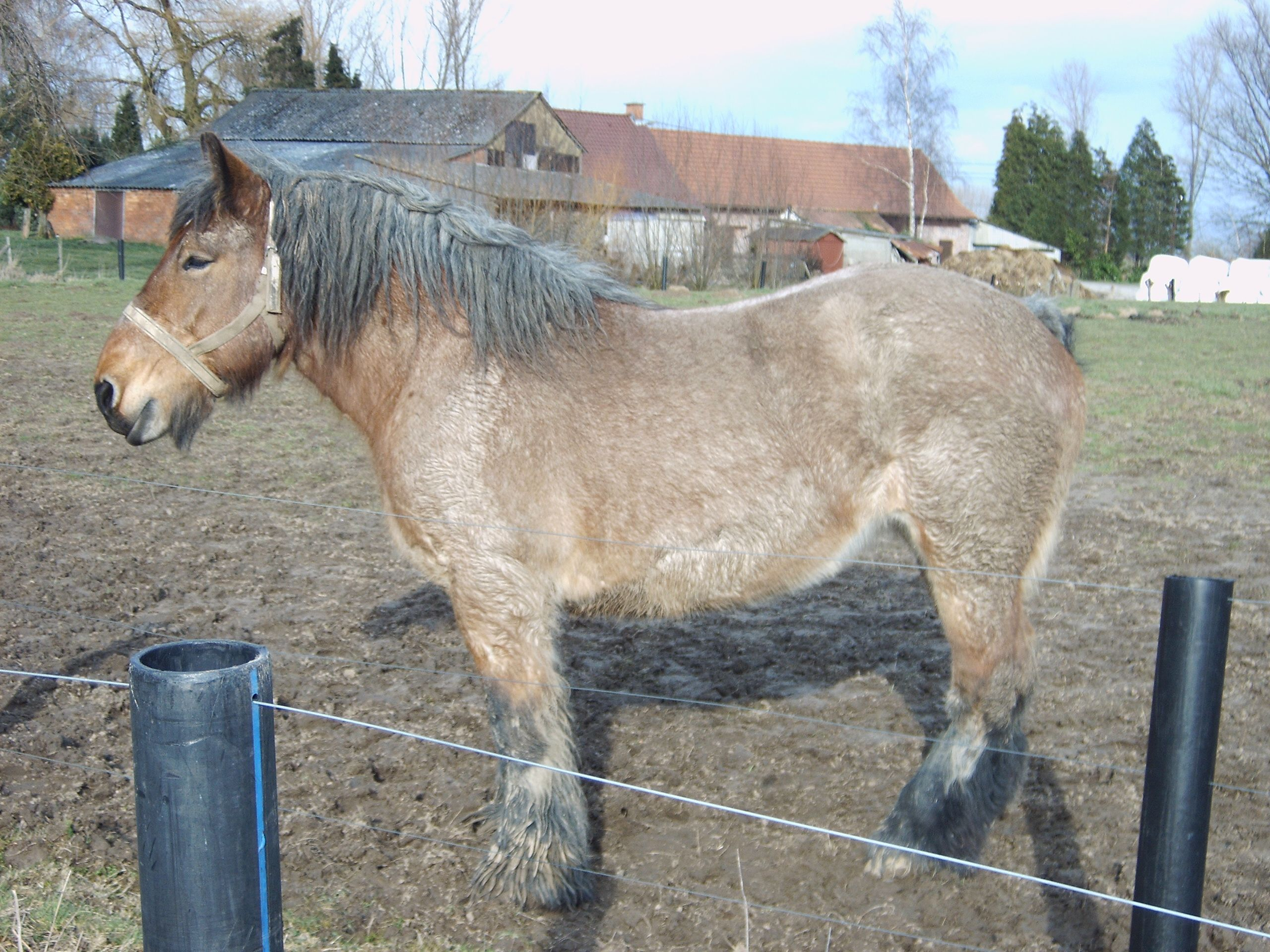 Eigen gemaakte foto van een Brabands trekpaard